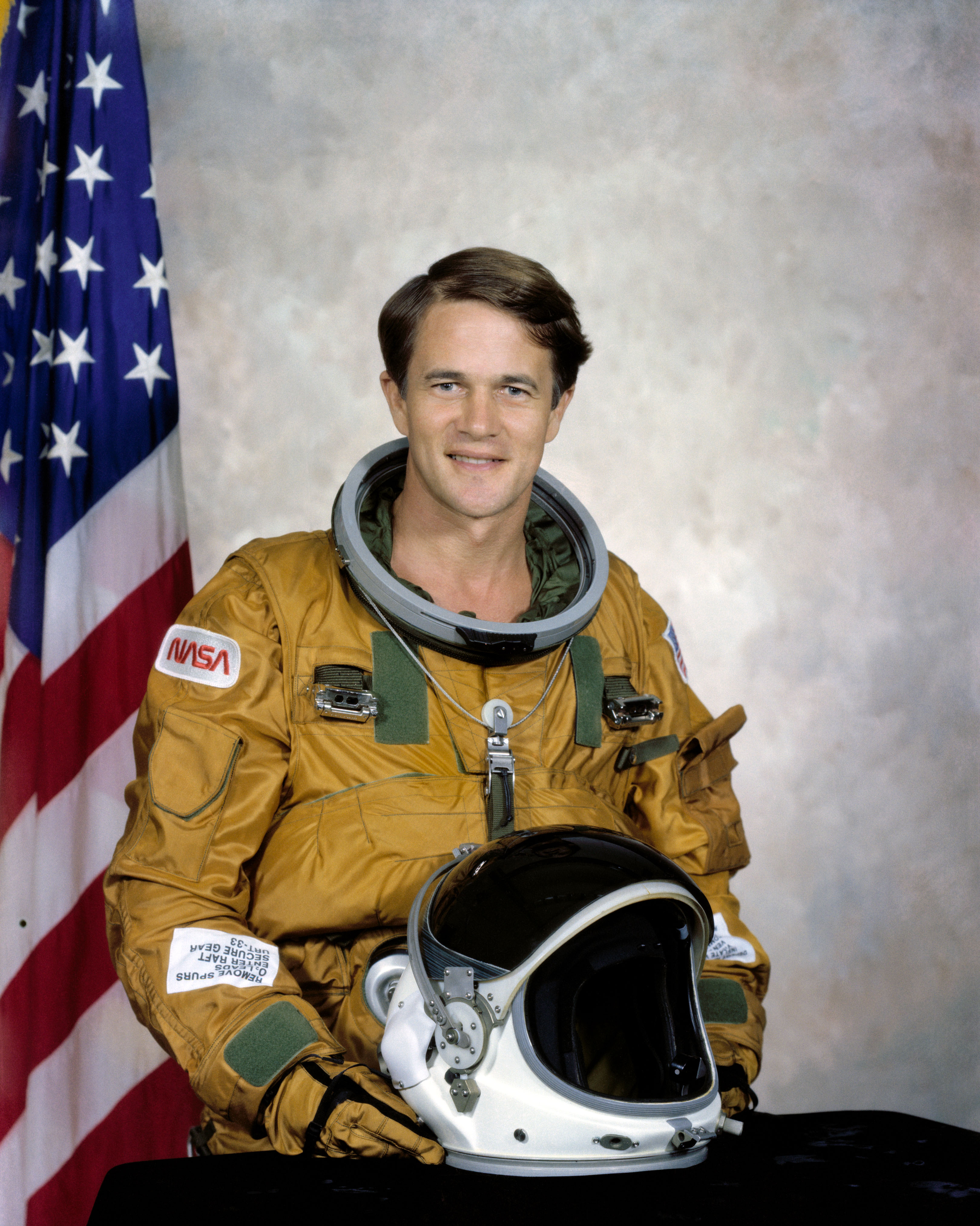 NASA astronaut Joseph Allen